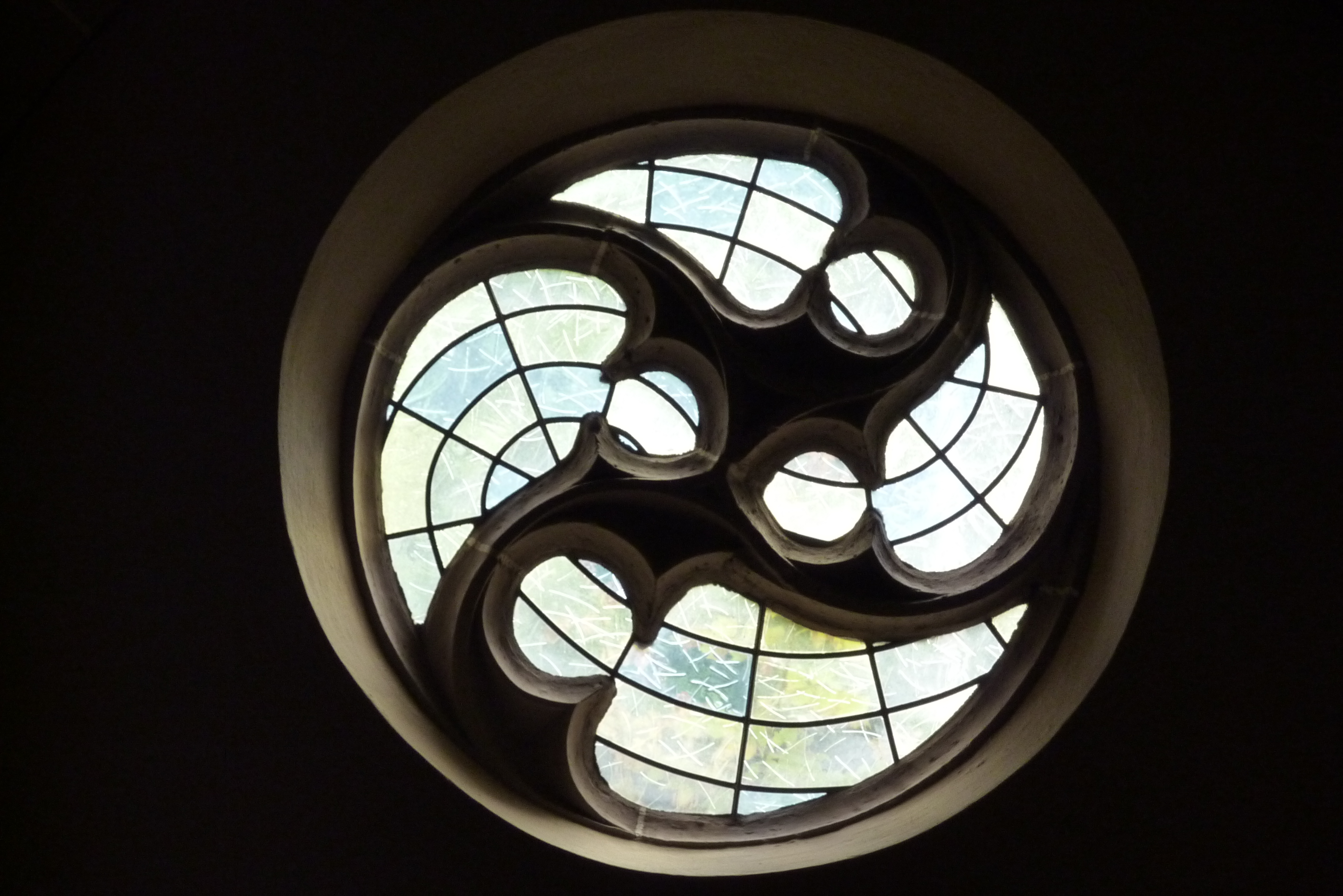 Rhens: Kirche St. Theresia, rundes Maßwerkfenster